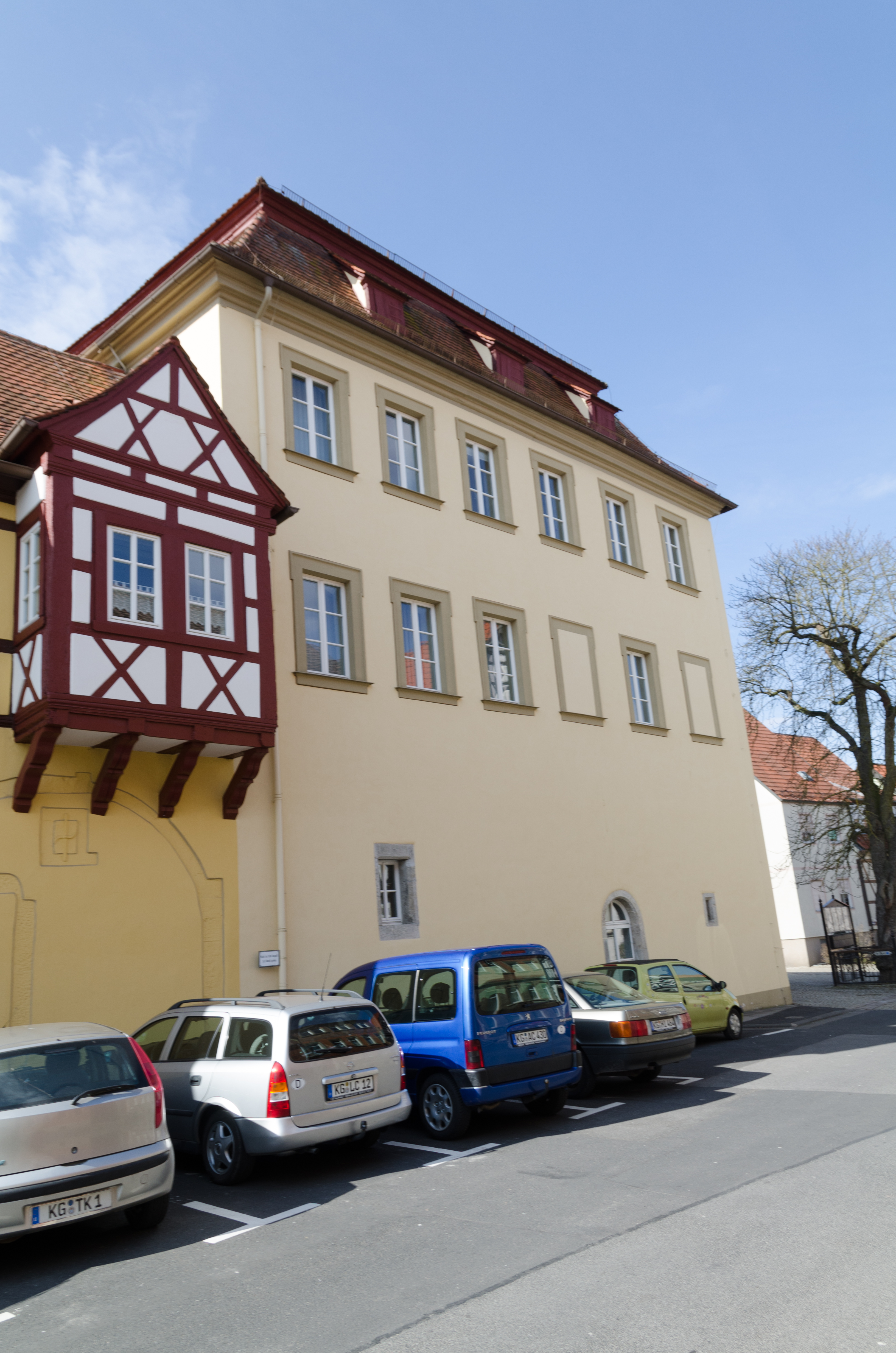 Münnerstadt, Landgerichtsgasse 1, Ostseite